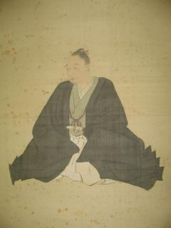 『村上忠順翁肖像』 （刈谷市中央図書館所蔵）